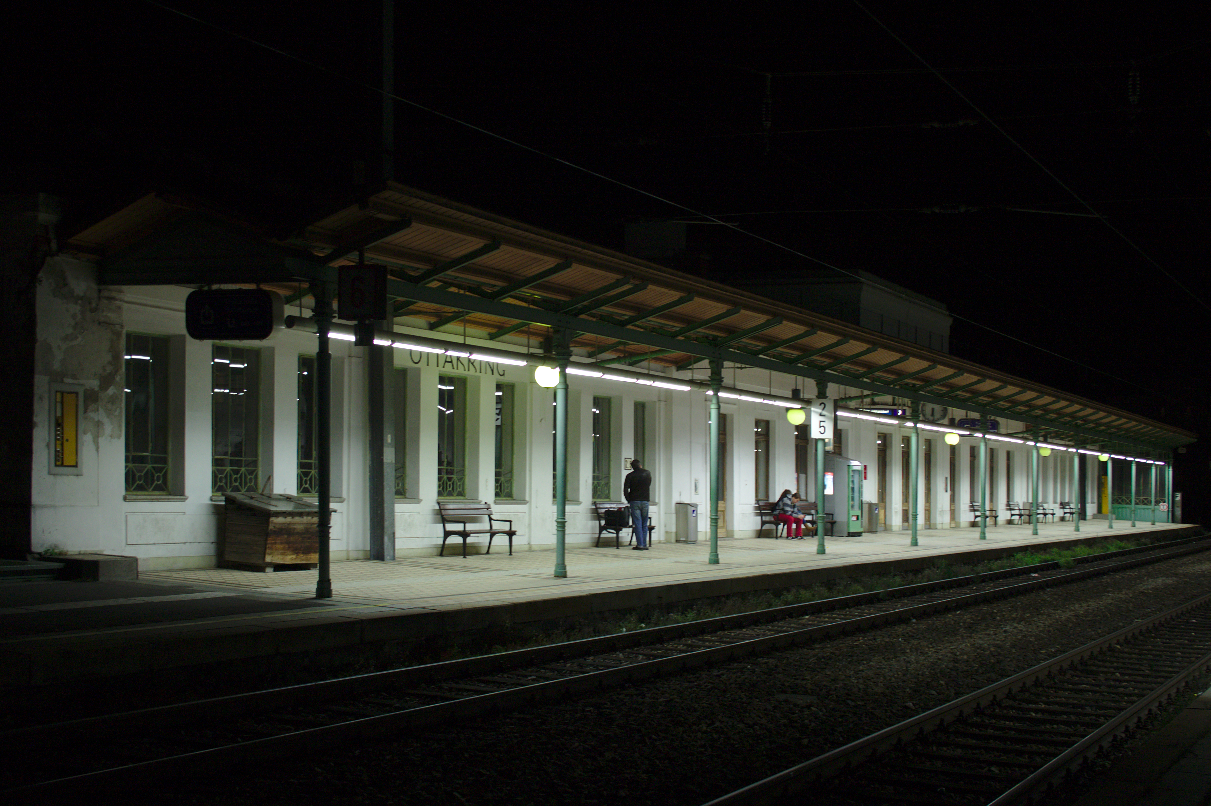 Eisenbahnstrecke, Wiener Vorortelinie - Teilbereich Ottakring mit Station Ottakring